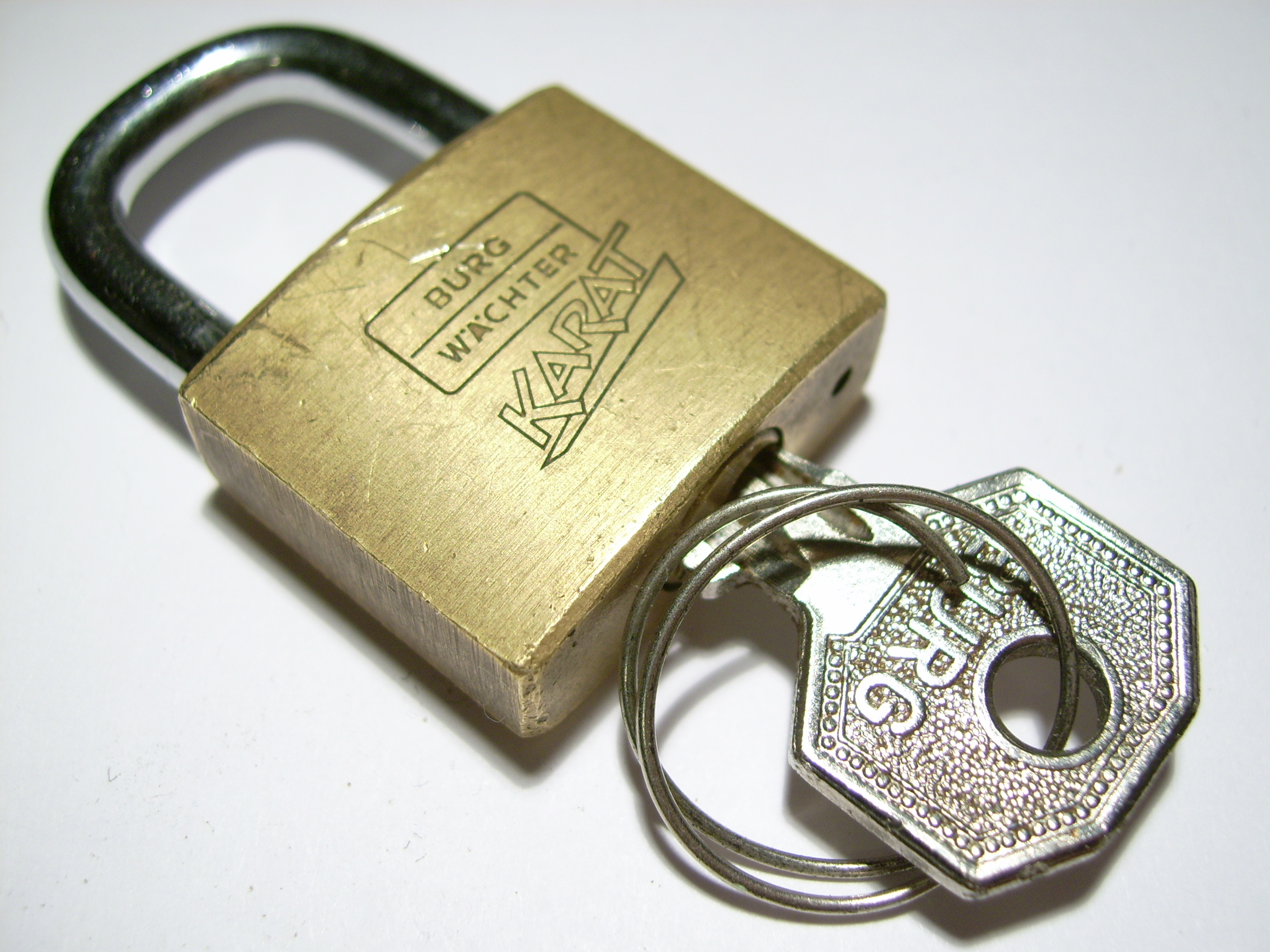 Burgwächter Schloss mit Schlüssel